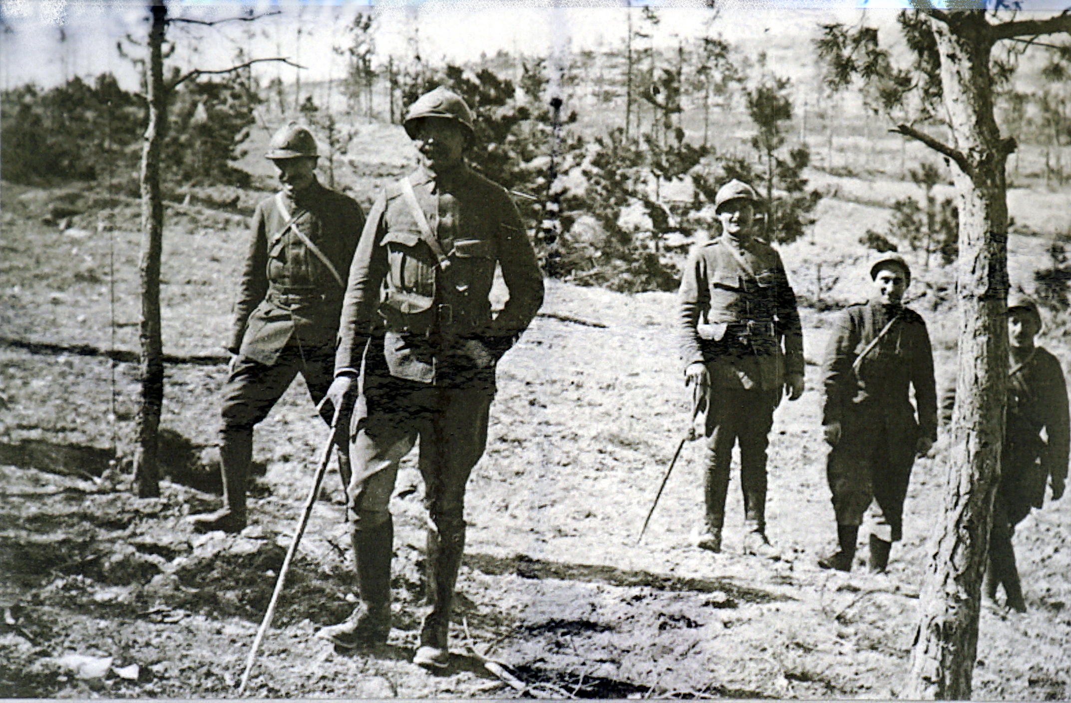 lors de la bataille des monts de chamapgne.